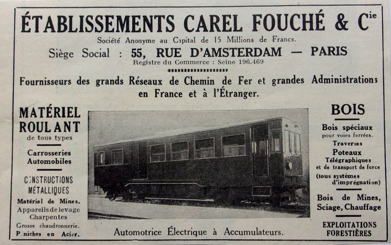 Ancienne publicite pour materiel Roulant de Carel Fouche & Cie.